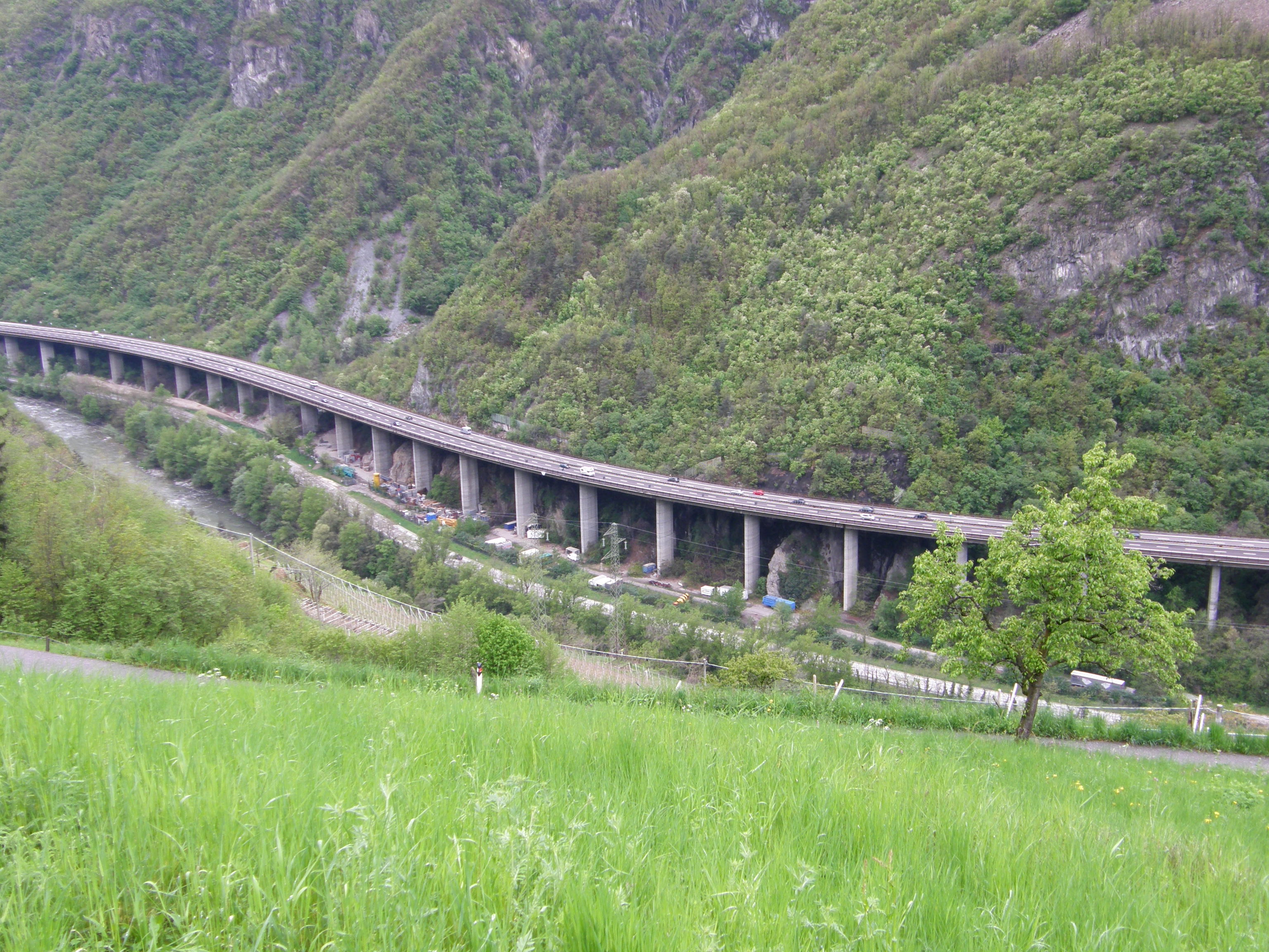 Viadukt Atzwang an der Brennerautobahn